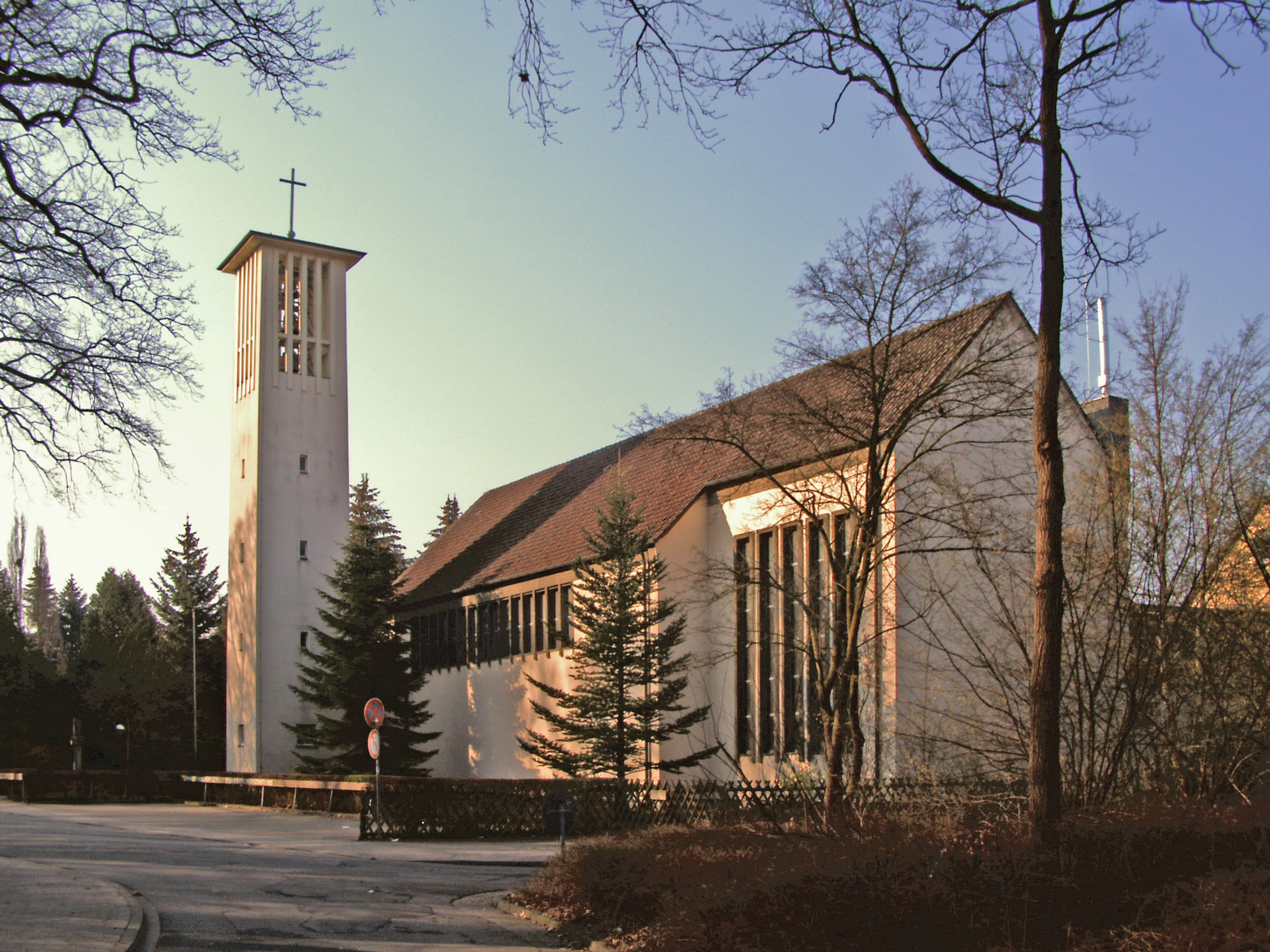 Katholische Kirche St. Maria in Sehnde